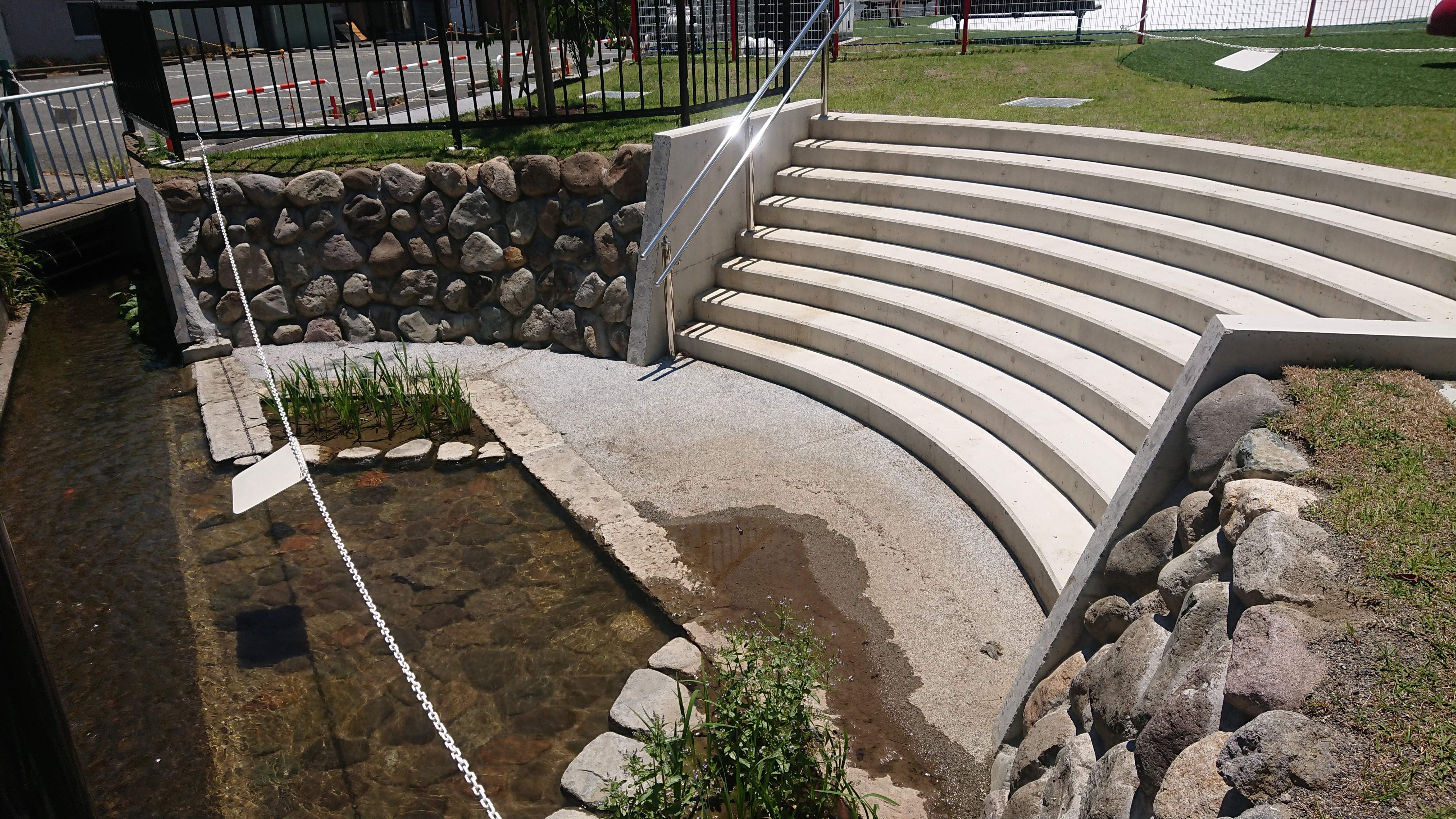 セントラルスクゥエア（中沢川親水）